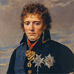 Gustaf Mauritz Armfelt aged 44